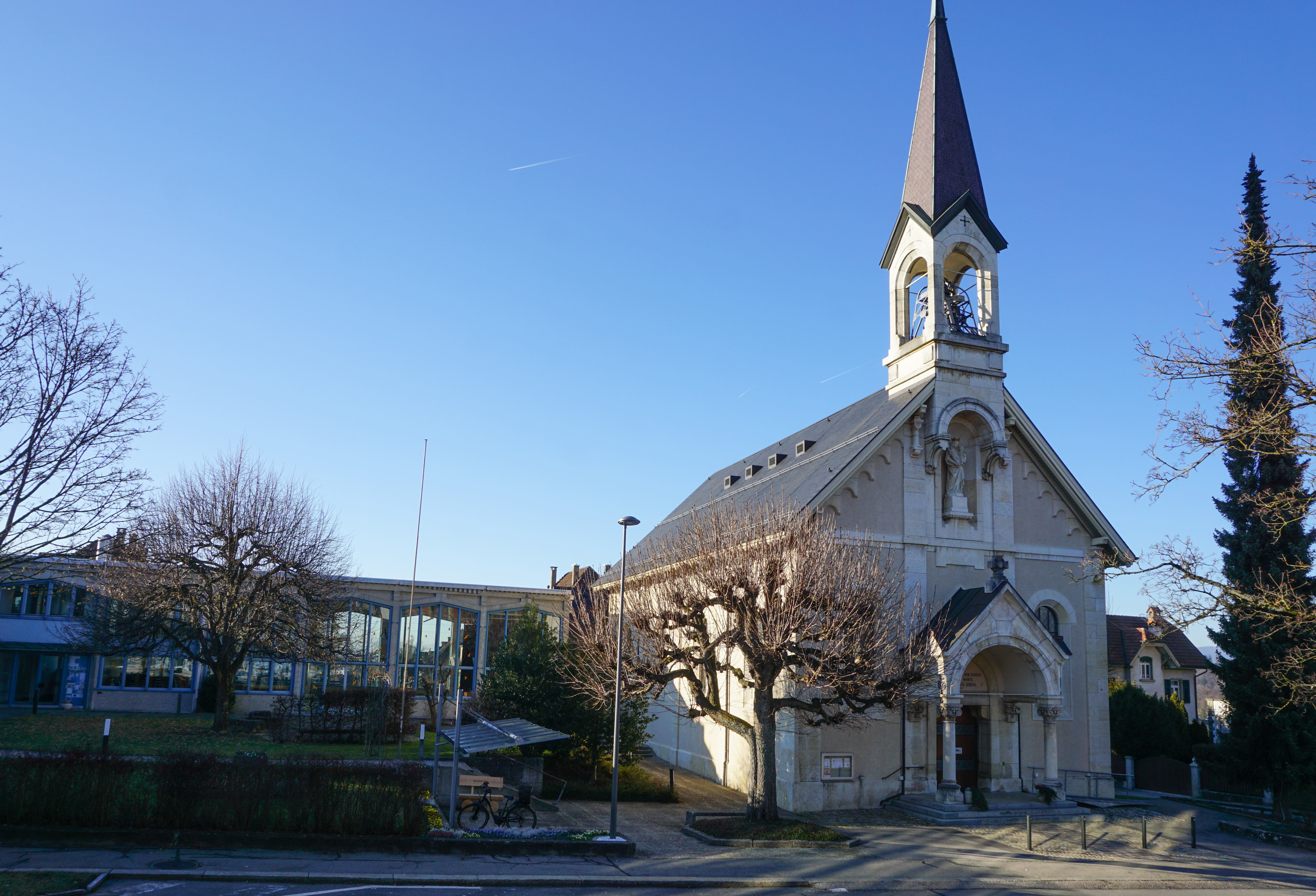 Kirche Maria Himmelfahrt Burgdorf, Aussenansicht mit Pfarrsaal